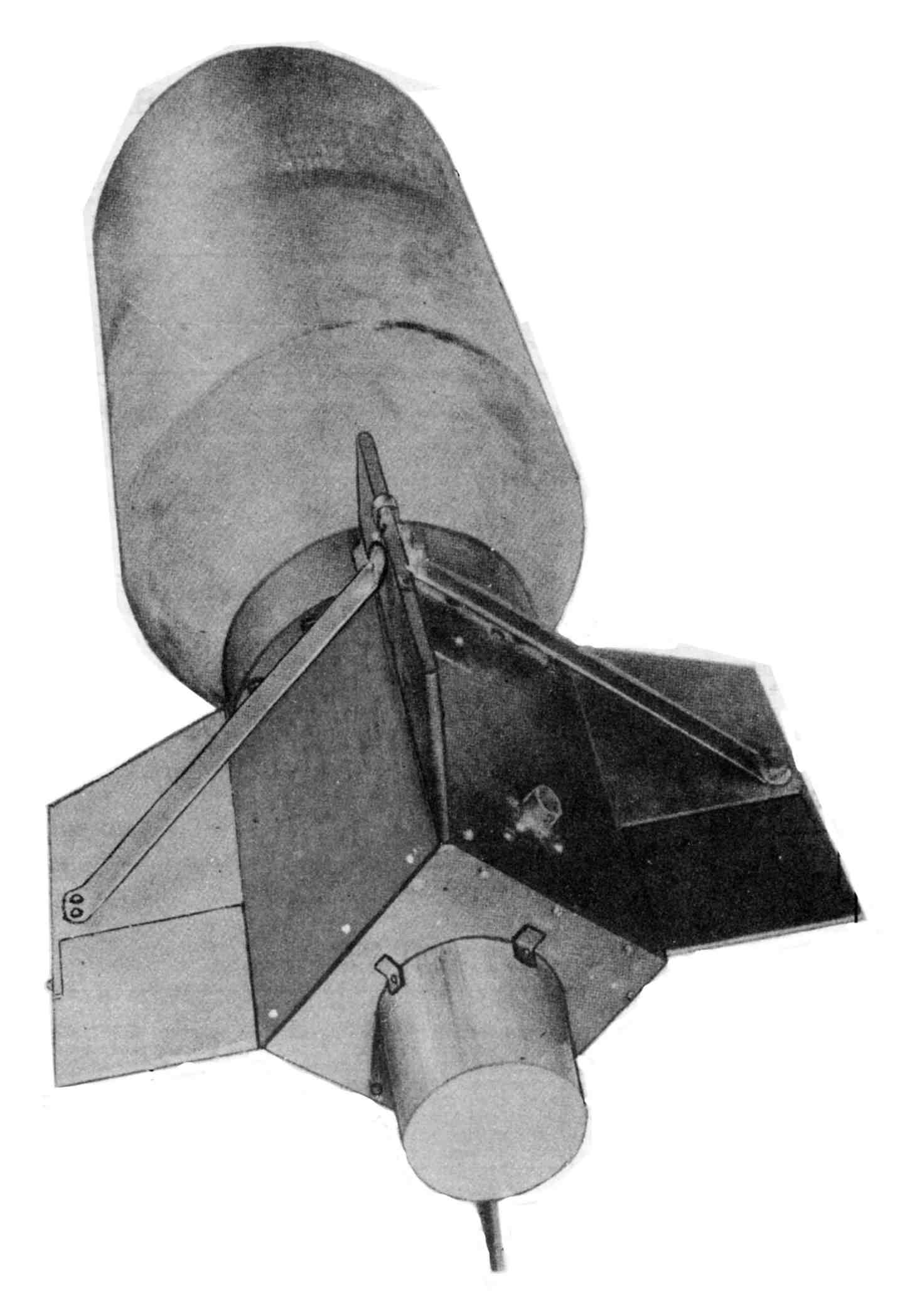 Amerykańska bomba VB-1 Azon